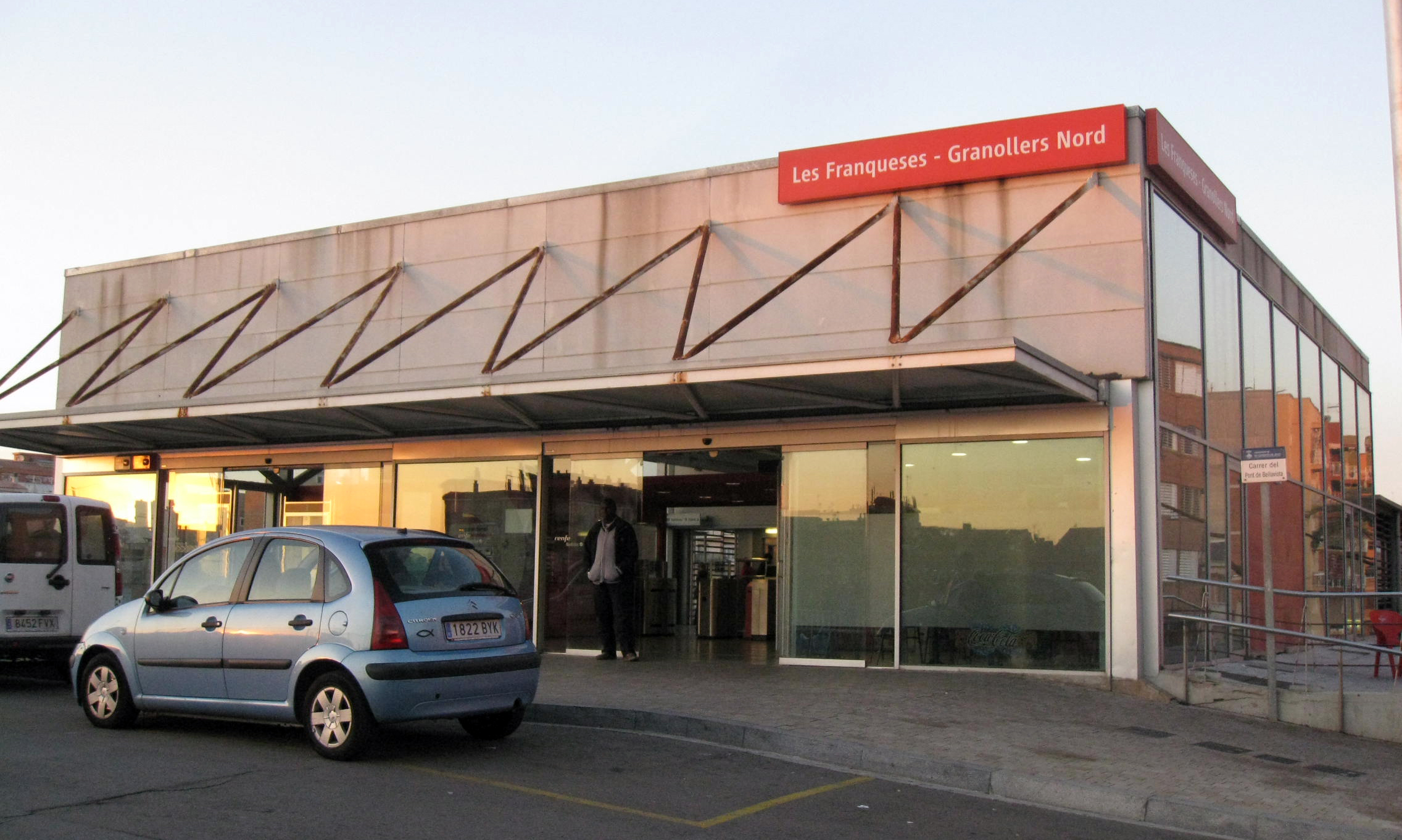 Estació de les Franqueses - Granollers Nord (Vallès Oriental).